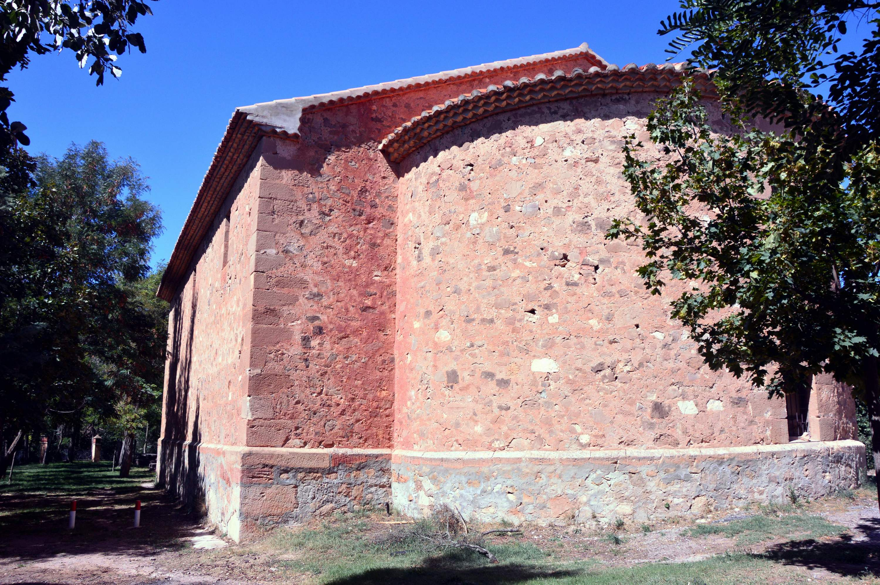 Detalle del ábside semicircular en la Ermita de la Purísima de Riodeva (Teruel), 2017.